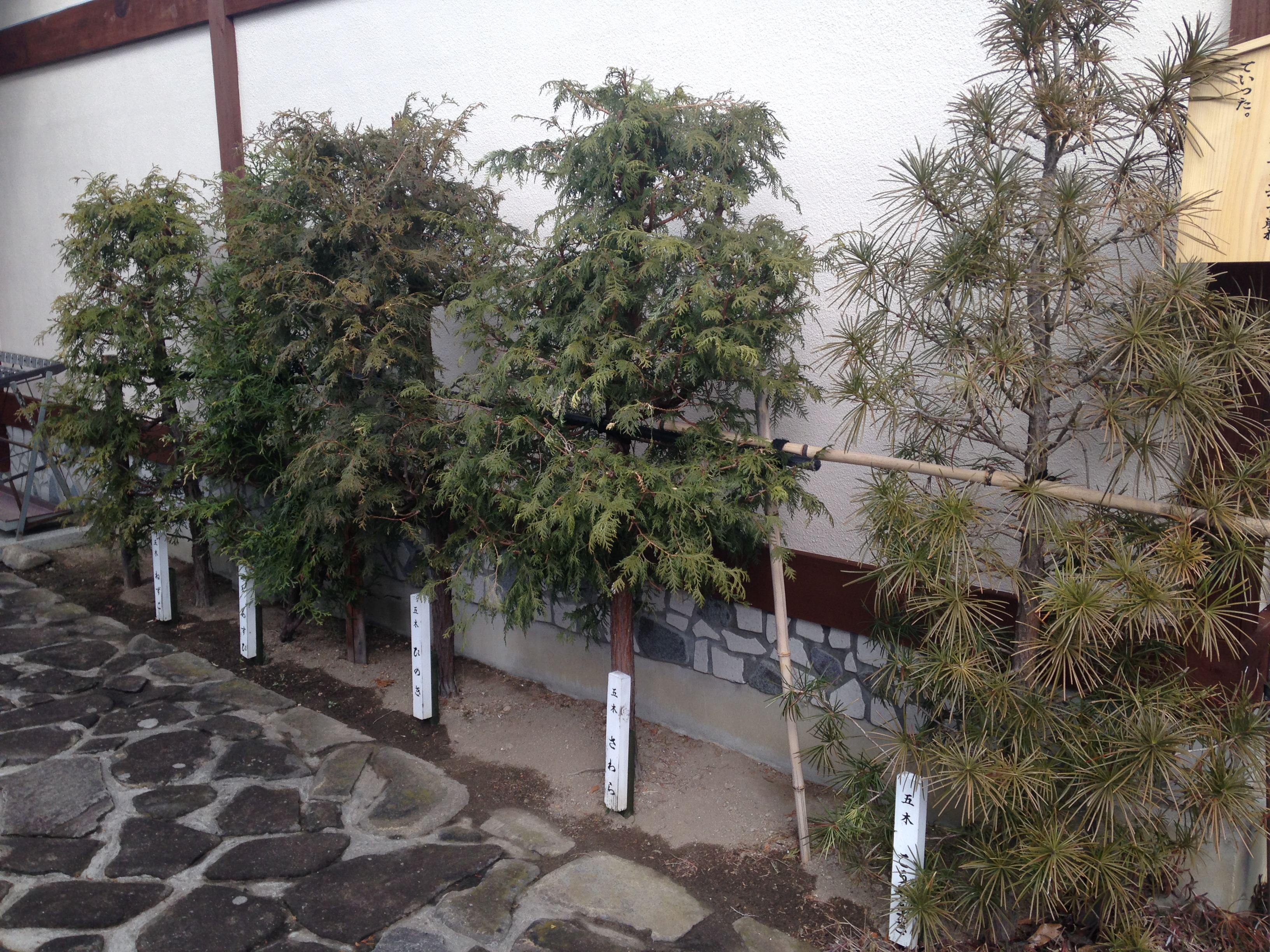 馬籠脇本陣史料館前に植樹した木曽五木